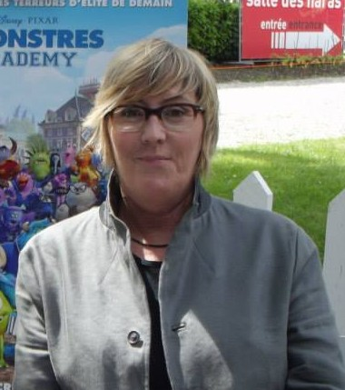 Kori Rae au Festival International du Film d'Animation d'Annecy le 10 juin 2013